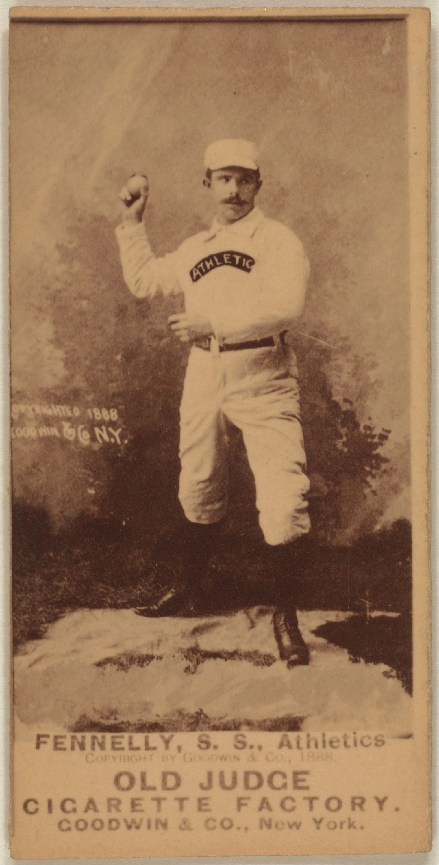 Frank Fennelly